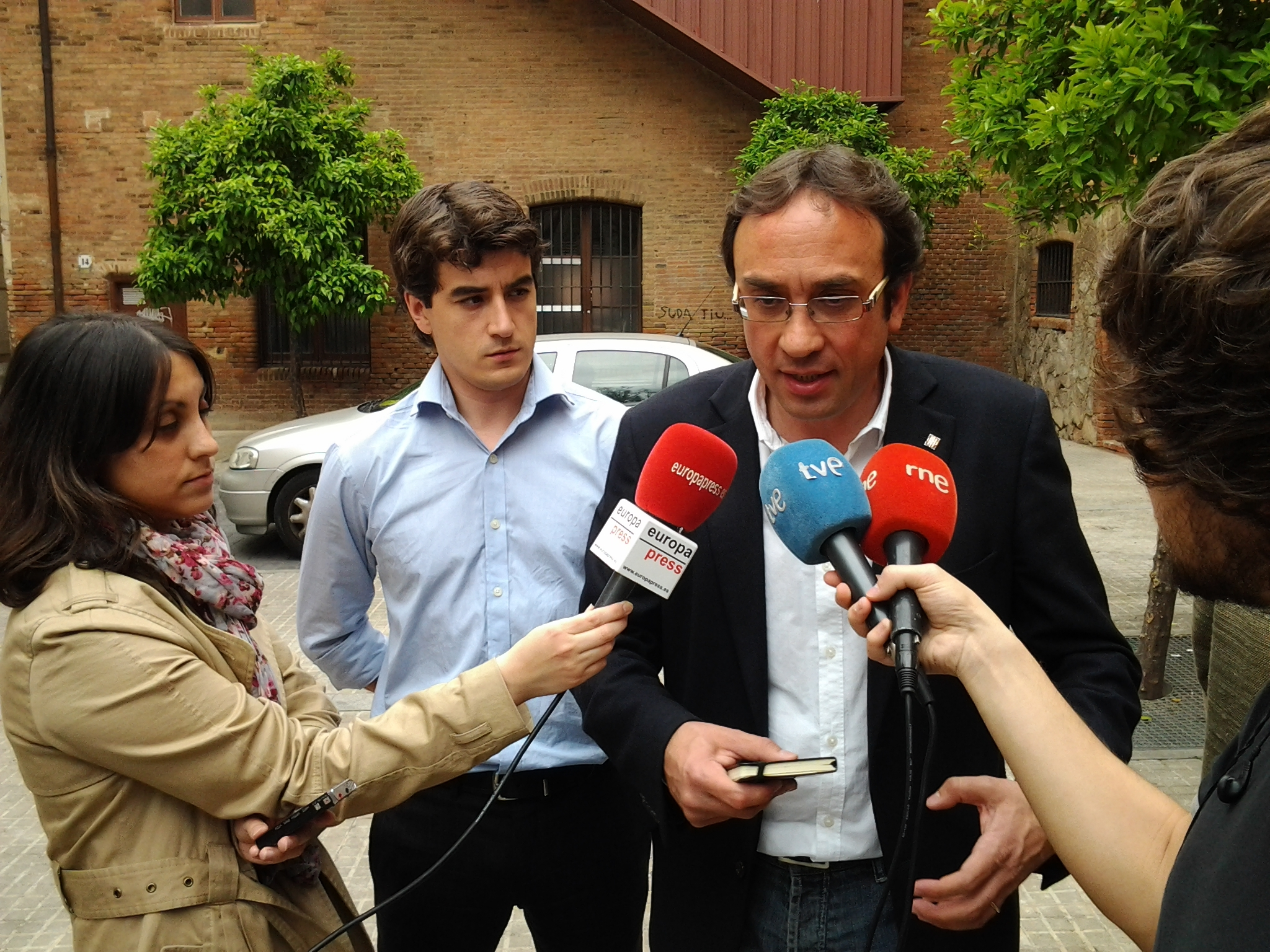 Josep Rull aten els mitjans a Terrassa.